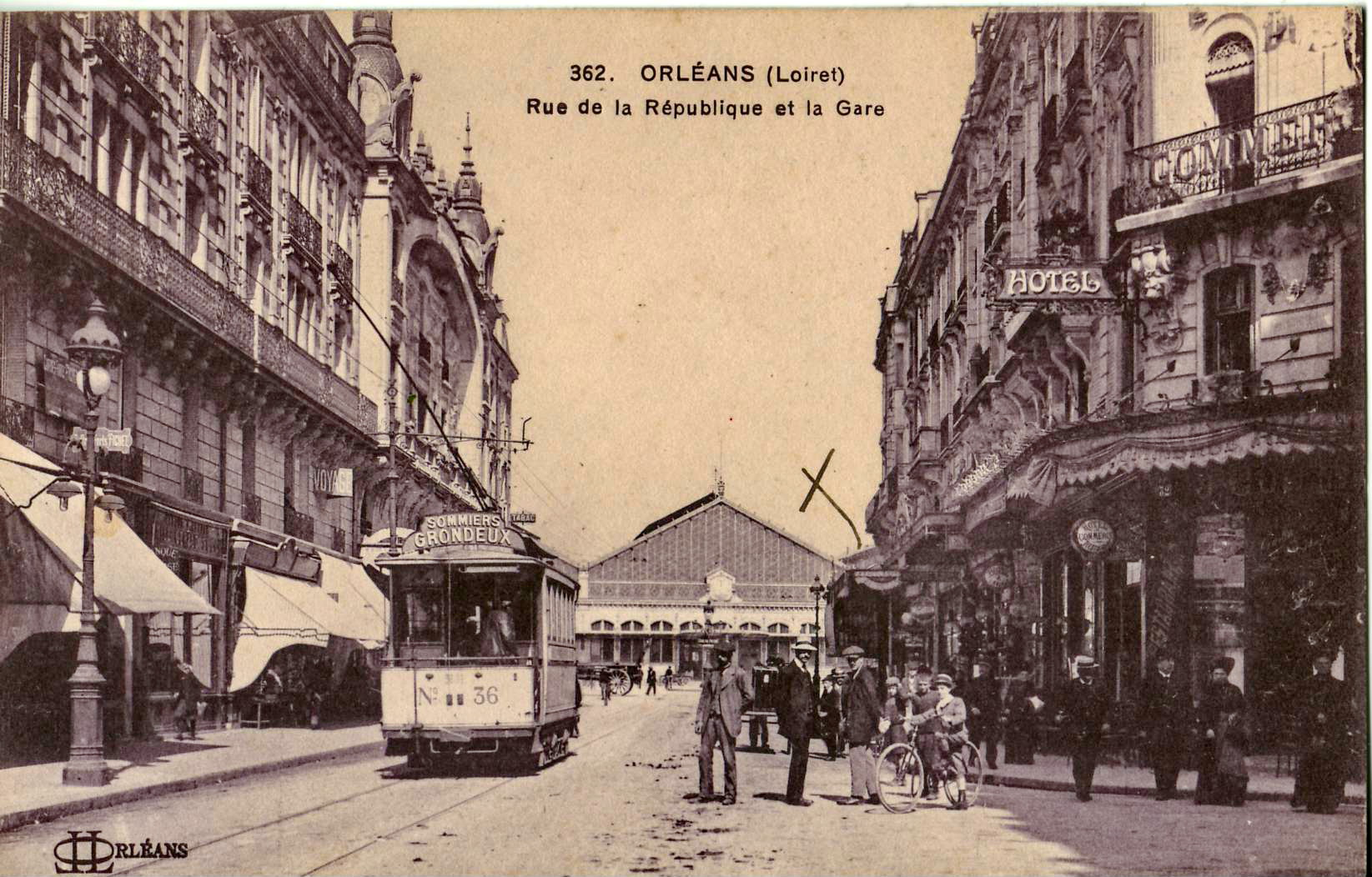 Carte postale ancienne éditée par OLL, n°362 : ORLEANS - Rue de la République et la Gare